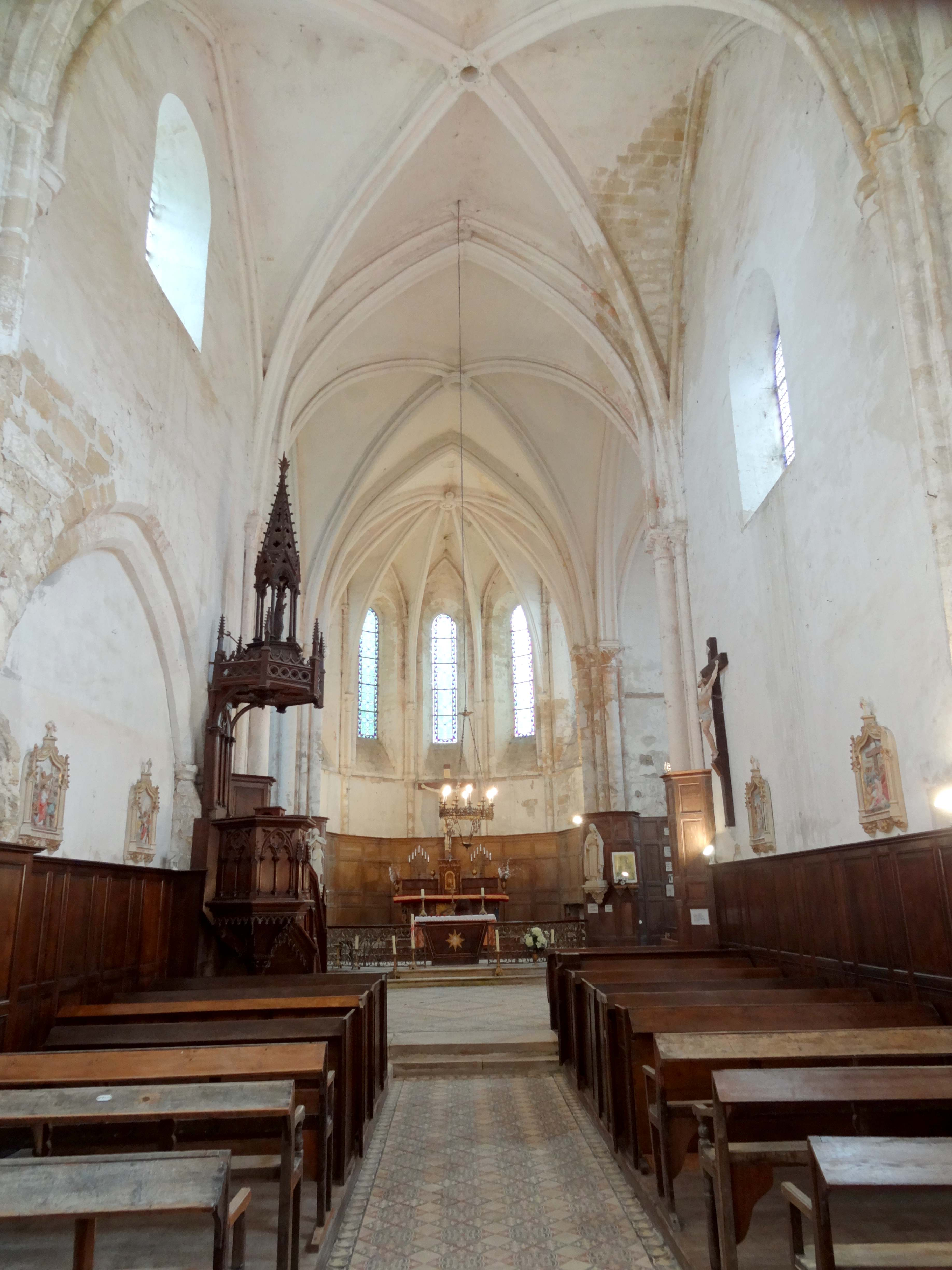 Intérieur de l'église - voir titre.